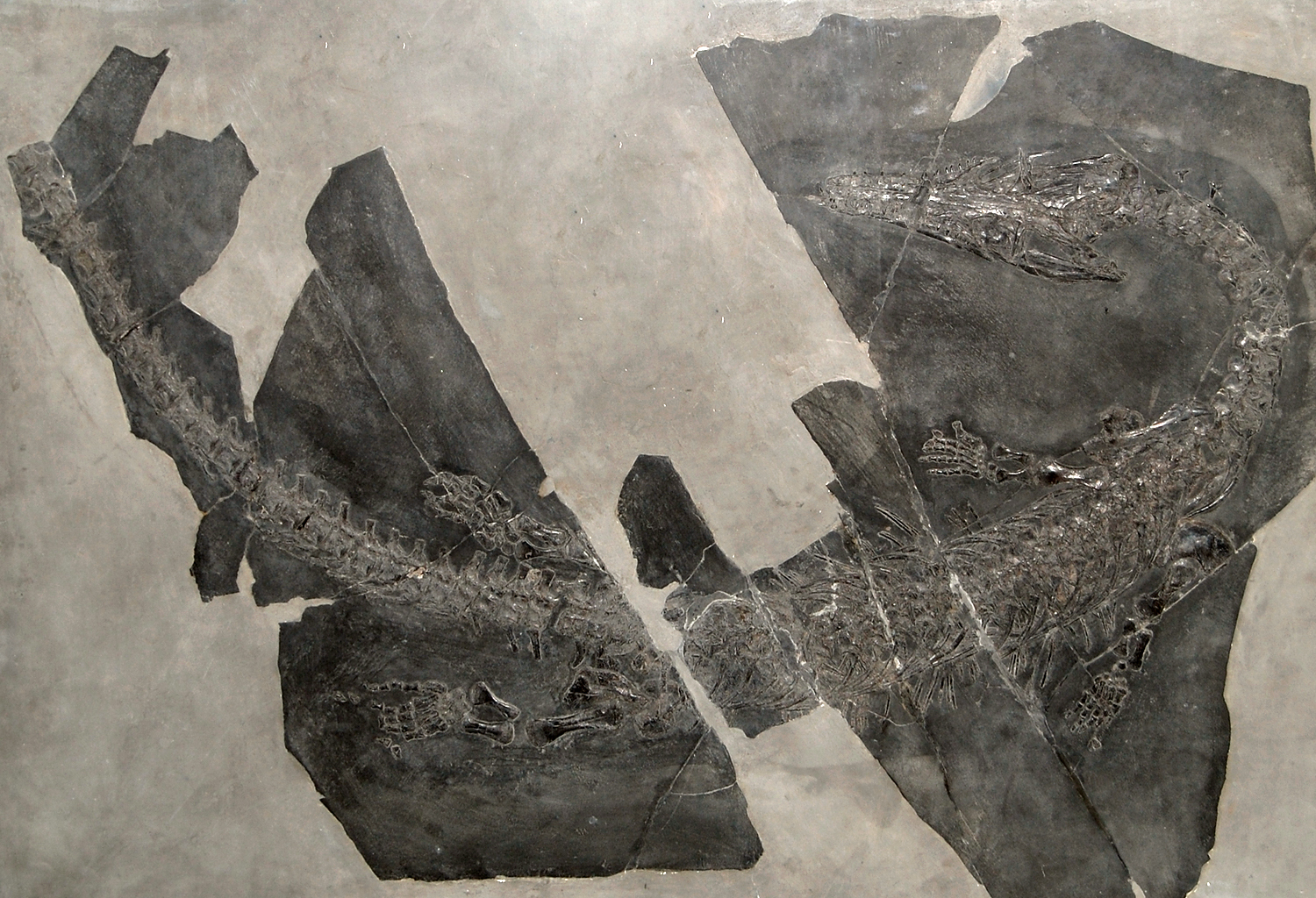 Museo civico di storia naturale Milano